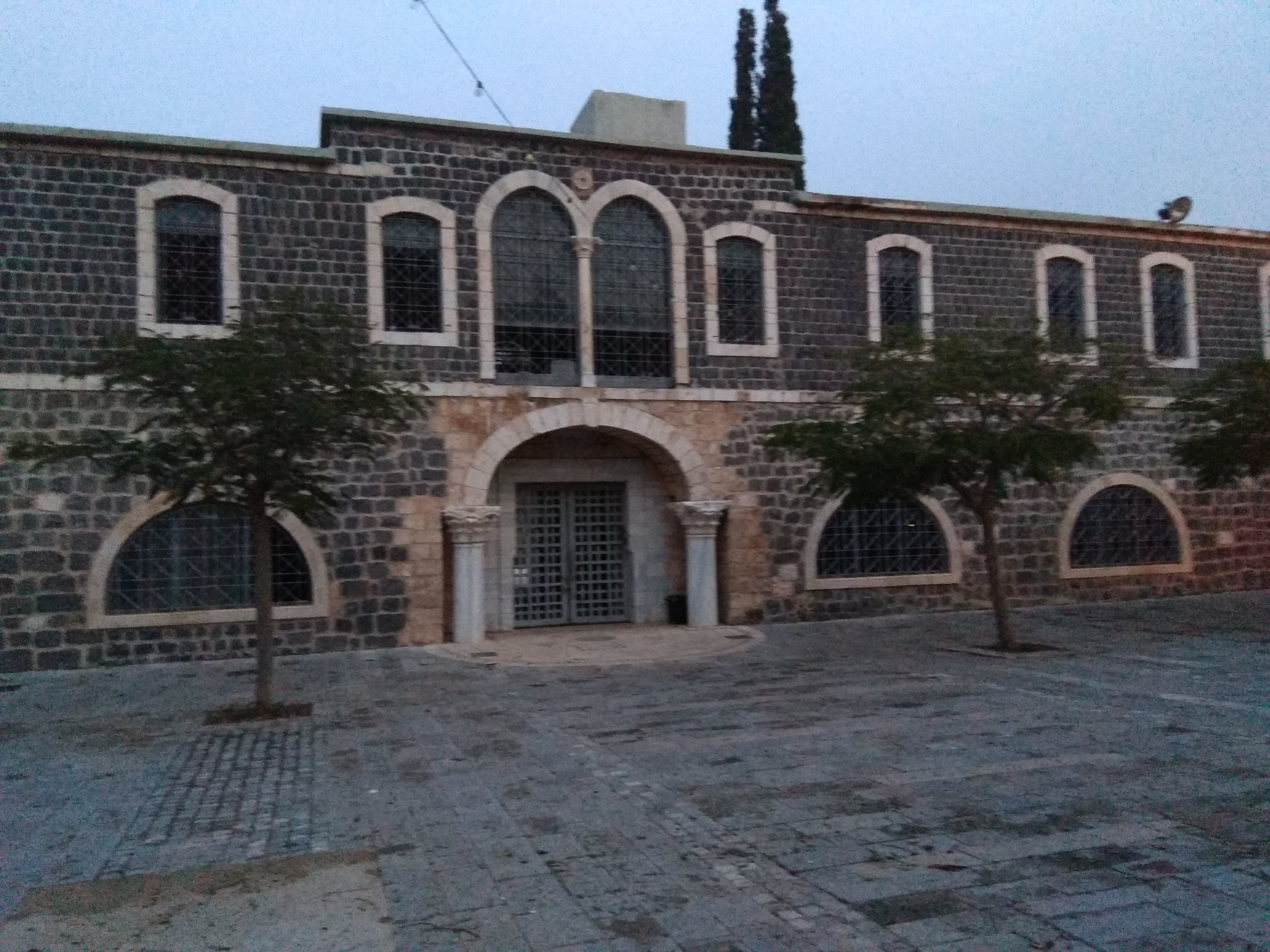 מתחם הסראיה